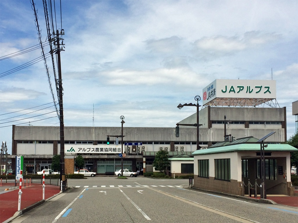 富山地方鉄道本線上市駅駅舎